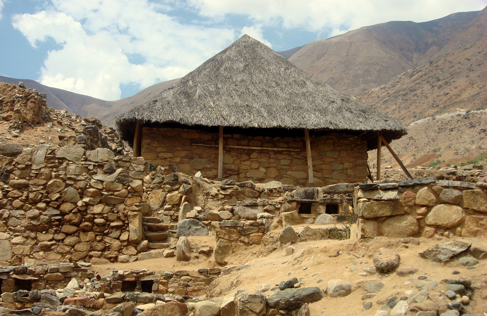 Kotosh es una de las evidencias más antiguas de construcciones dedicadas a la actividad ceremonial o religiosa en el Perú, y la forma de sus templos y la disposición de sus elementos interiores definen al más antiguo movimiento religioso del antiguo Perú, conocido hoy en día como "Tradición Mito".